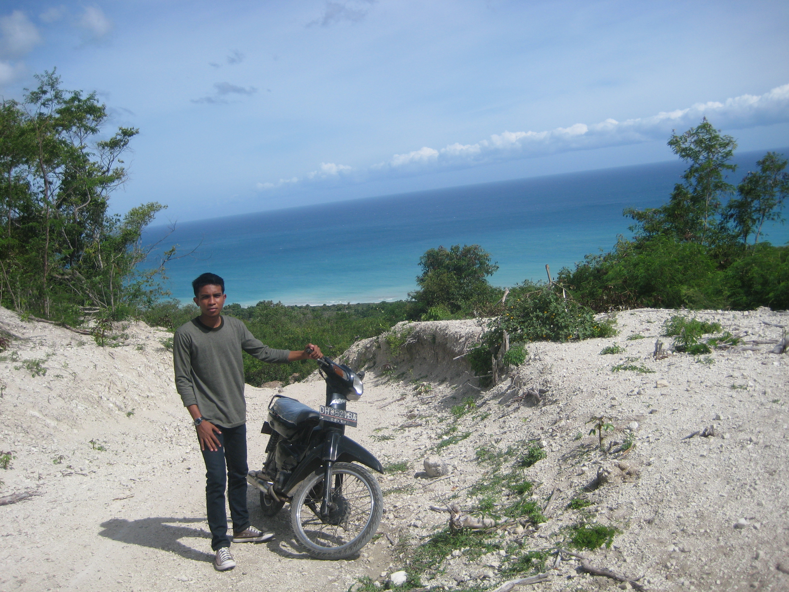 foto ini saya ambil di buraen amarasi selatan, Kupang NTT. ini jalan yang berbukit dan berbatu dan cukup terjal dan memiliki pemandangan mengarah ke laut dan keindahan alam di NTT sangat indah dan Luar biasa